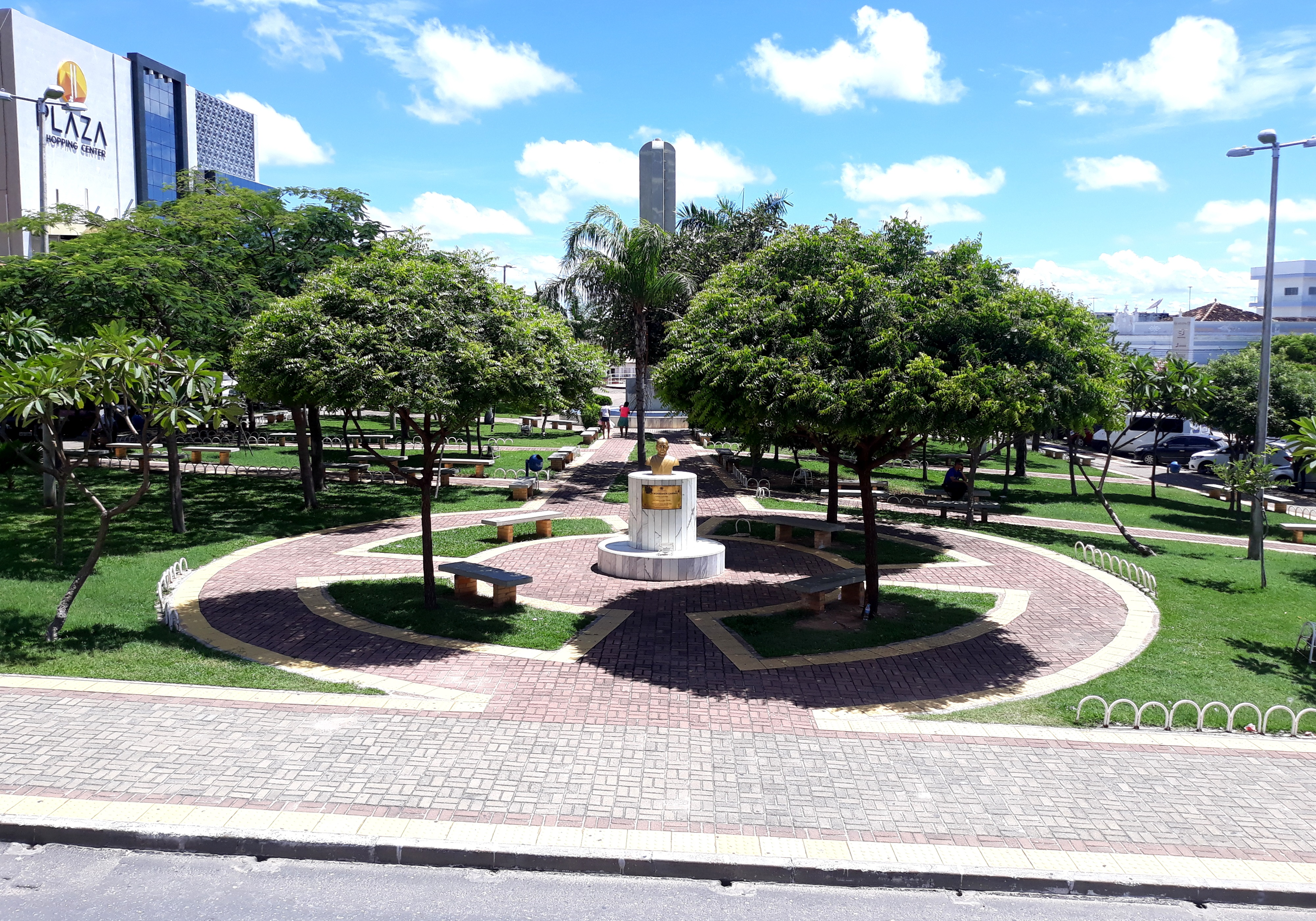 Praça Monsenhor Caminha (Praça da Matriz), no centro de Pau dos Ferros, Rio Grande do Norte (Brasil), com o obelisco ao fundo.